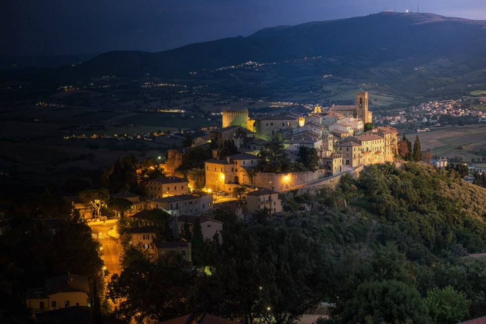 Centro storico di Gualdo Cattaneo This is a photo of a monument which is part of cultural heritage of Italy.